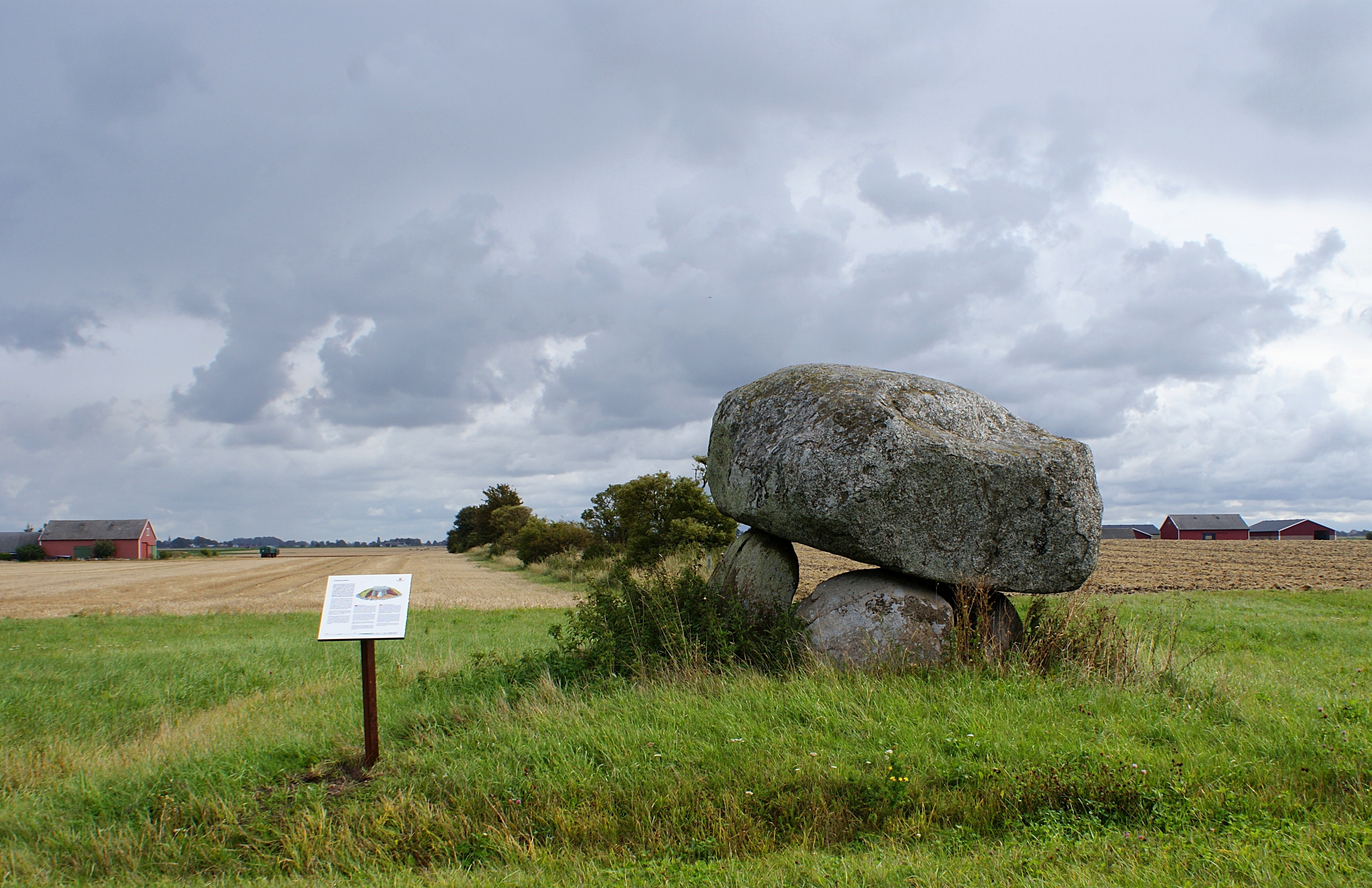 Eskilstorpsdösen